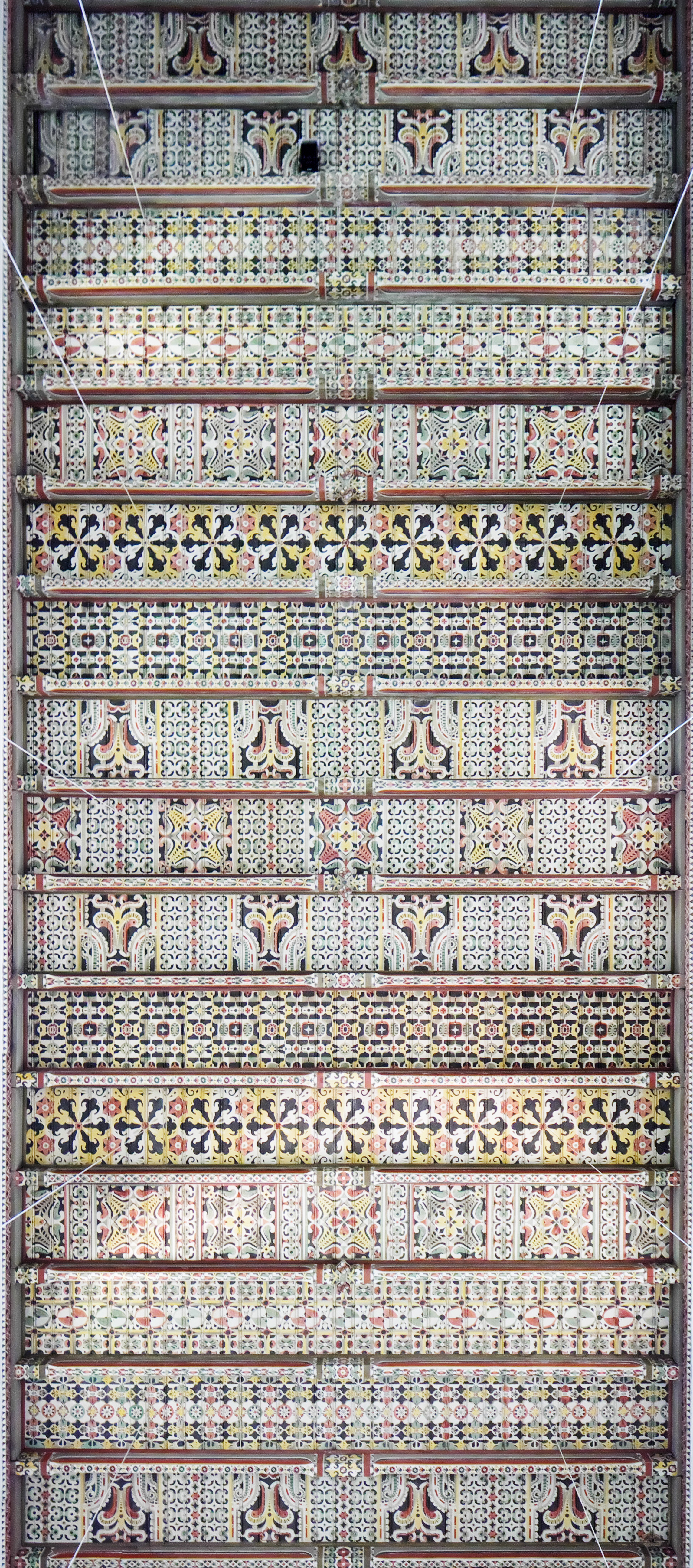 Bemalte Holzdecke in der Liebfrauenkirche in Jüterbog, Brandenburg, Deutschland.